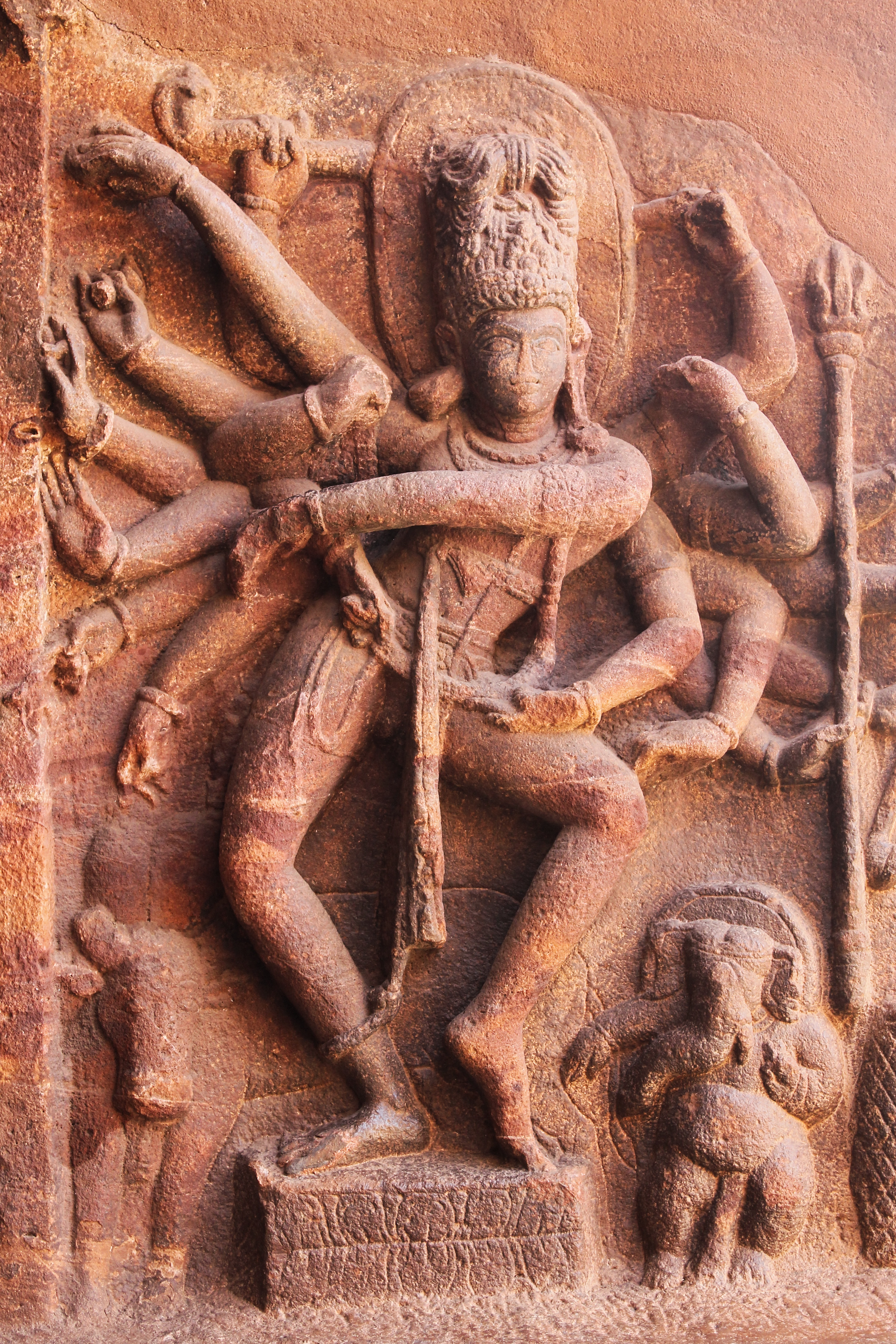 Shiva dansant, tenant le damaru (petit tambour indien), le serpent, le trident et la vina (luth) Dancing Shiva Siwa Siva Hinduism